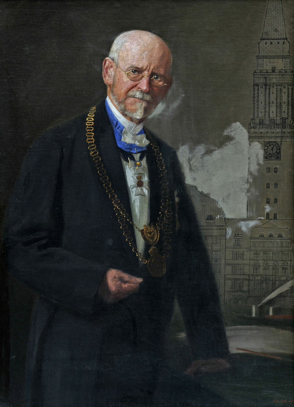 Gemälde "Oberbürgermeister Paul Fuss" (1911) von Maler Hans Olde.